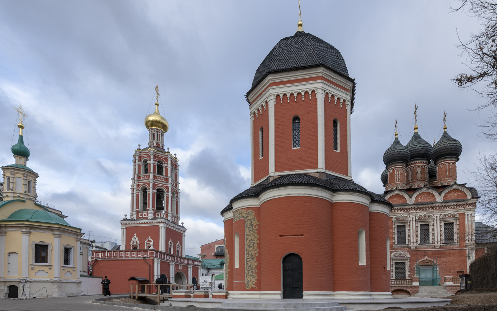 Сергей Собянин осмотрел итоги реставрации Высоко-Петровского монастыря